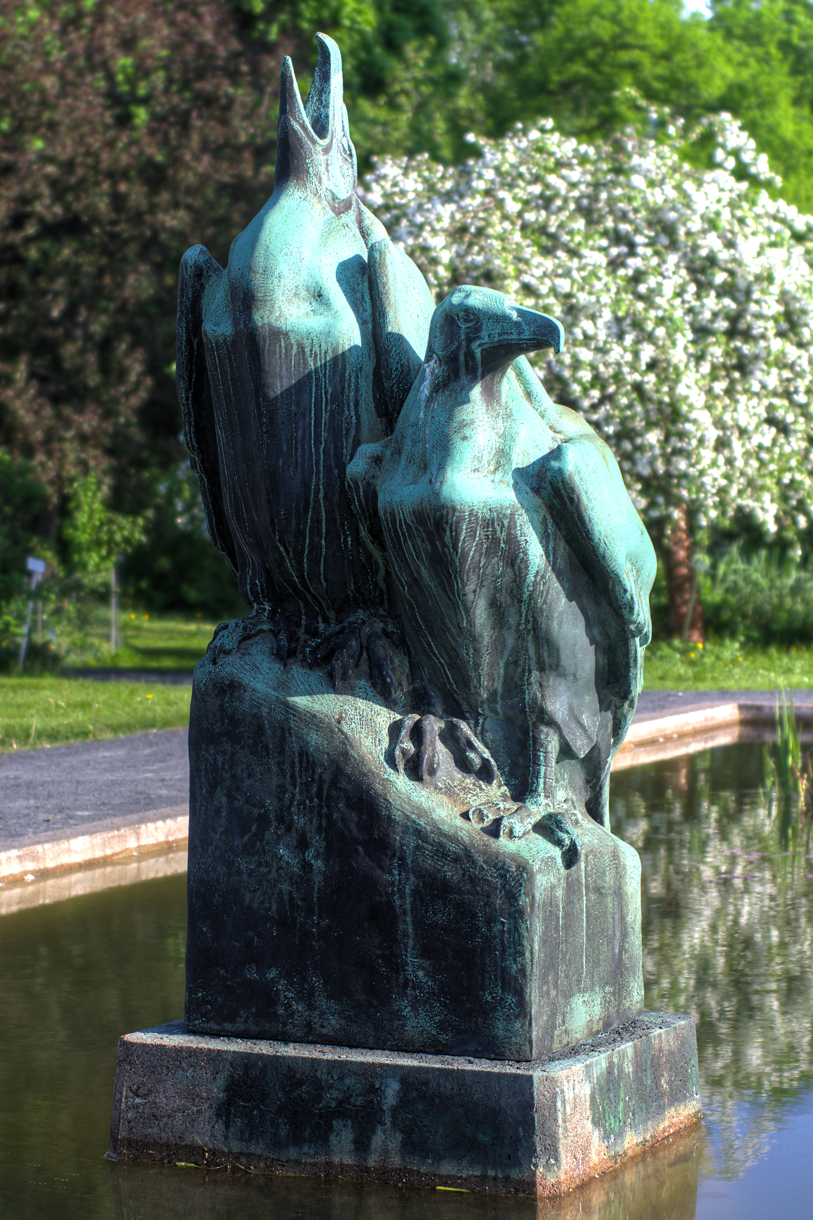 Kotkia (1913) - Bertel Nilsson. Sijainti: Yliopiston kasvitieteellinen puutarha, Kluuvi